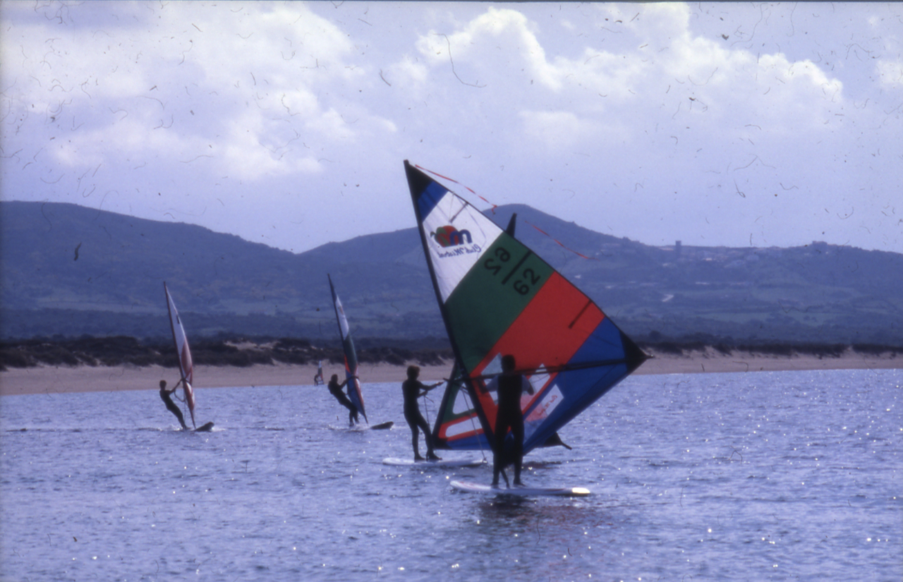 Località non identificate. Ricerche personali: mare e paesaggi. Serie fotografica : Italia, 1982 / Paolo Monti. - Foglio: 1, Fotogrammi complessivi: 20/20 : Diapositiva, sviluppo cromogeno/ pellicola ; 35 mm. - ((Sullo chassis di alcune diapositive numeri manoscritti. - Fonte: Rubrica di Paolo Monti: Diapositive 24x36mm (1948-1982), presso Archivio Paolo Monti. Rubrica con elenco soggetti e numeri di inventario (da 1 a 1000) corrispondenti ai fogli a tasche in pvc in cui sono contenute le diapositive.